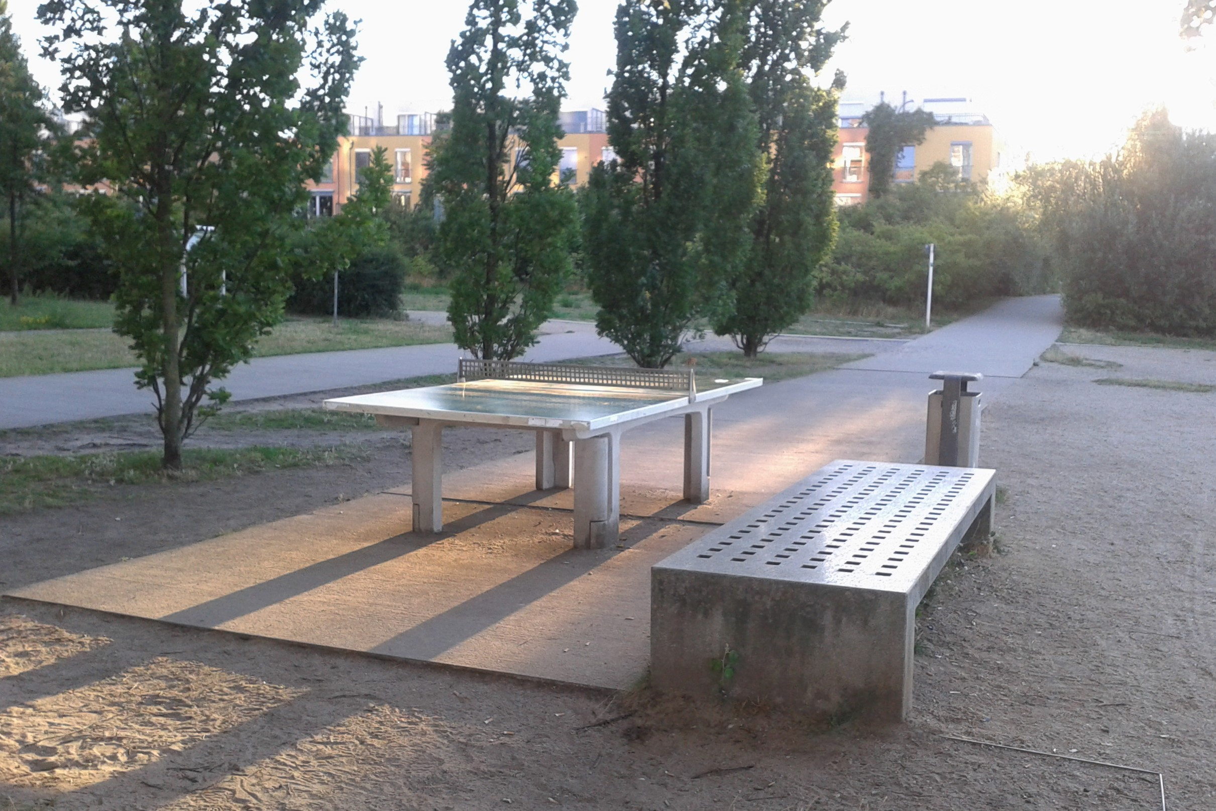 Spaziergang über die Halbinsel Strahlau, eine Berliner Landzunge zwischen der Spree und dem Rummelsburger See gelegen.